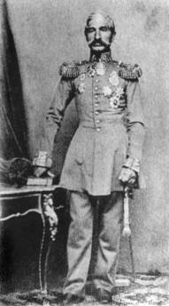 Кнез Александар Карађорђевић (1806-1885), владајући кнез Србије у периоду 1842-1858